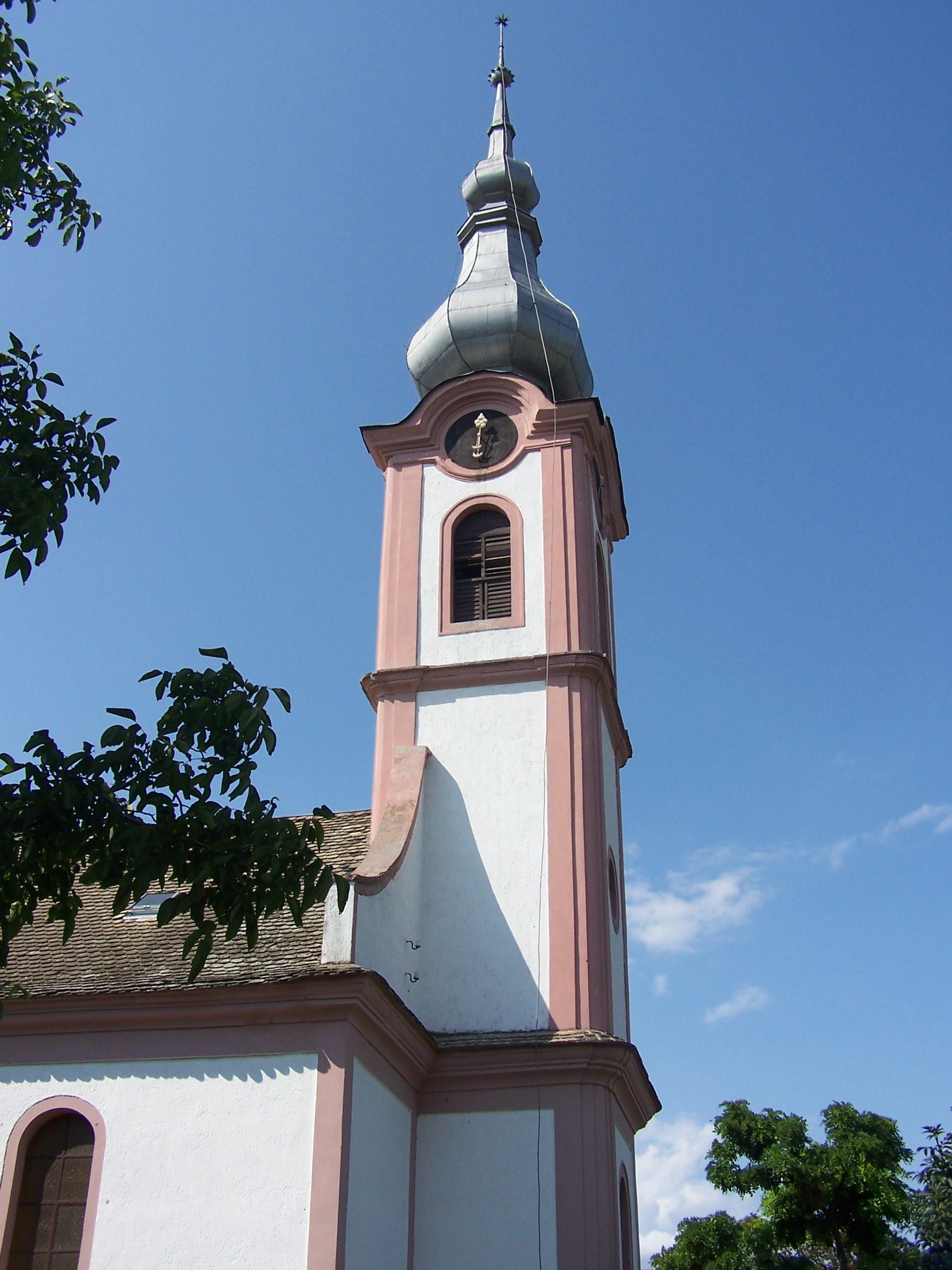 Ref. templom (Sárpilis, Kossuth u. 8.) This is a photo of a monument in Hungary. Identifier: 8716